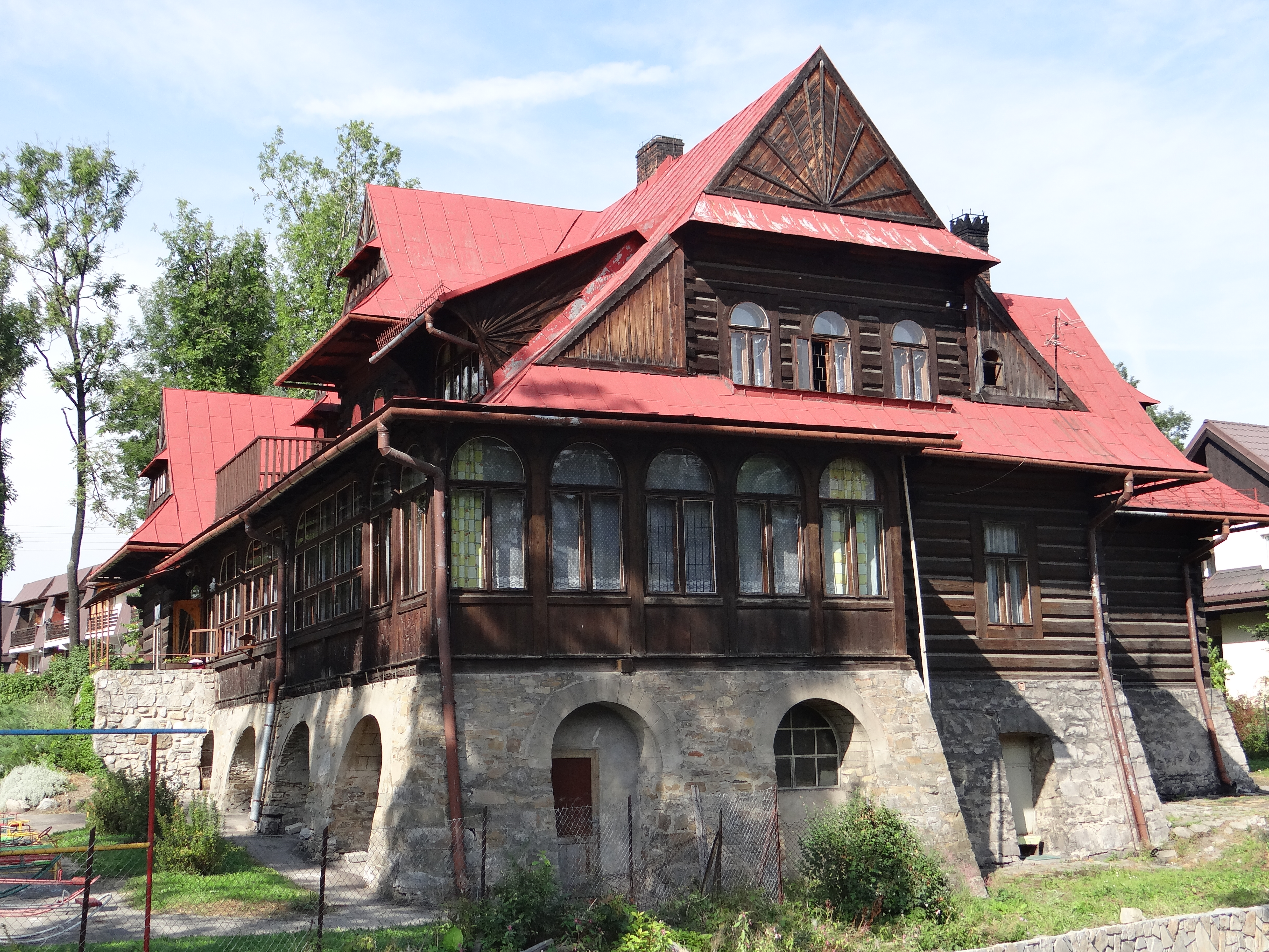 Zakopane, ul. Kasprusie 27 - willa „Czerwony Dwór” (zabytek nr /A-115/M)